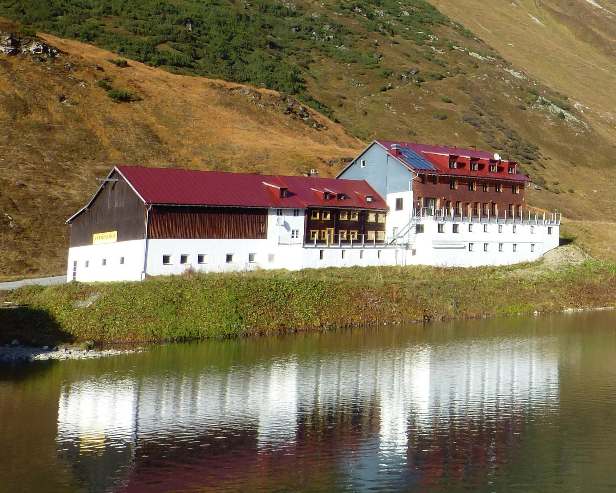 Blick von Südwesten auf den Alpengasthof Zeinisjoch am Ufer des Vorbecken Zeinis beim Zeinisjoch in der österreichischen Gemeinde Gaschurn